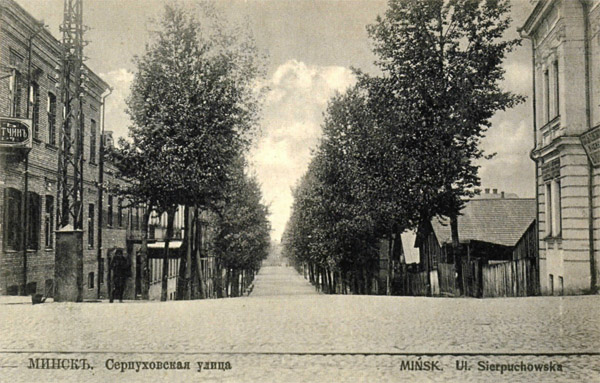 Серпухаўская вуліца (Валадарскага) ў бок Магазіннай (Кірава). (В.М.Целеш - альбом "Гарады Беларусі на старых паштоўках", Менск "Беларусь" 2001)